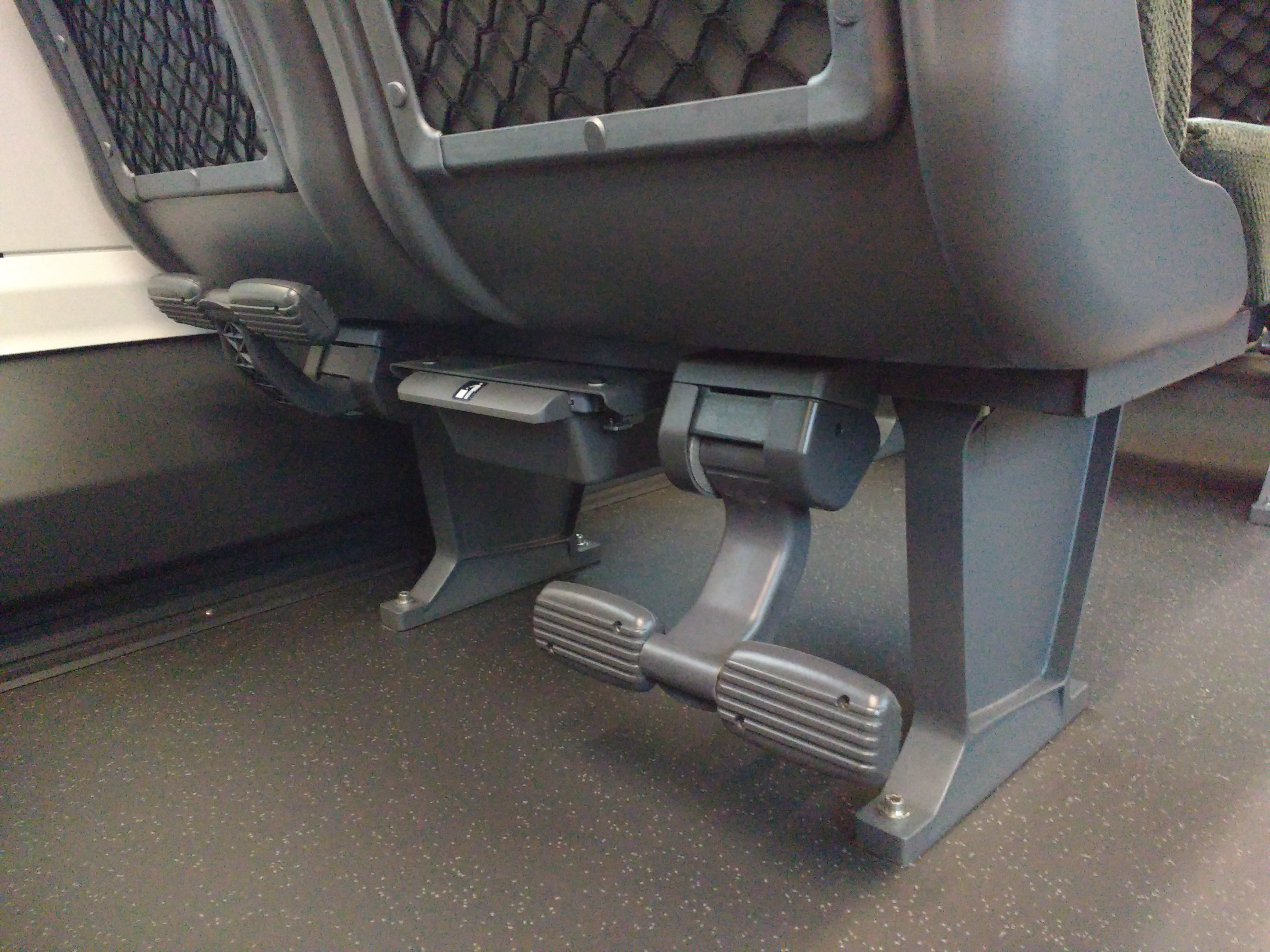 Fußablagen im ÖBB Railjet (Auslieferung 2016)